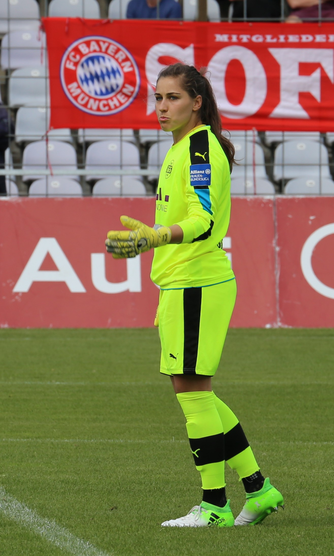 Lisa Weiß (SGS Essen) beim Frauen-Bundesliga-Spiel FC Bayern München gegen SGS Essen am 21. Mai 2017 im Stadion an der Grünwalder Straße (Ergebnis war 2:0)